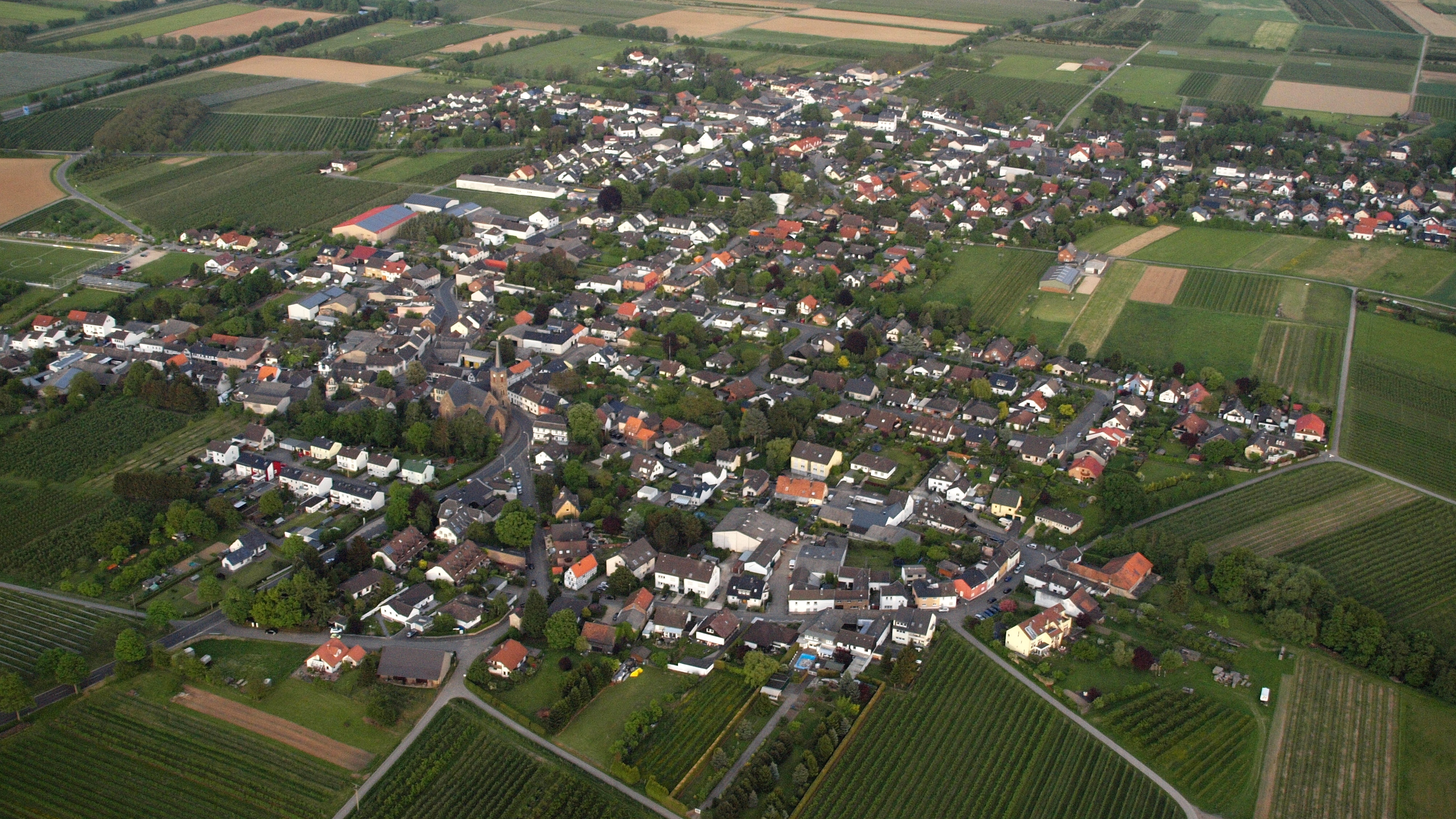 Ersdorf (vorne) und Altendorf (hinten), Luftaufnahme (2015)